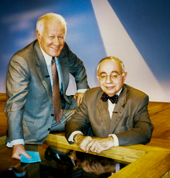 Le producteur et présentateur Jacques Chancel et le dirigeant de médias Jacques Rigaud en avril 1996.